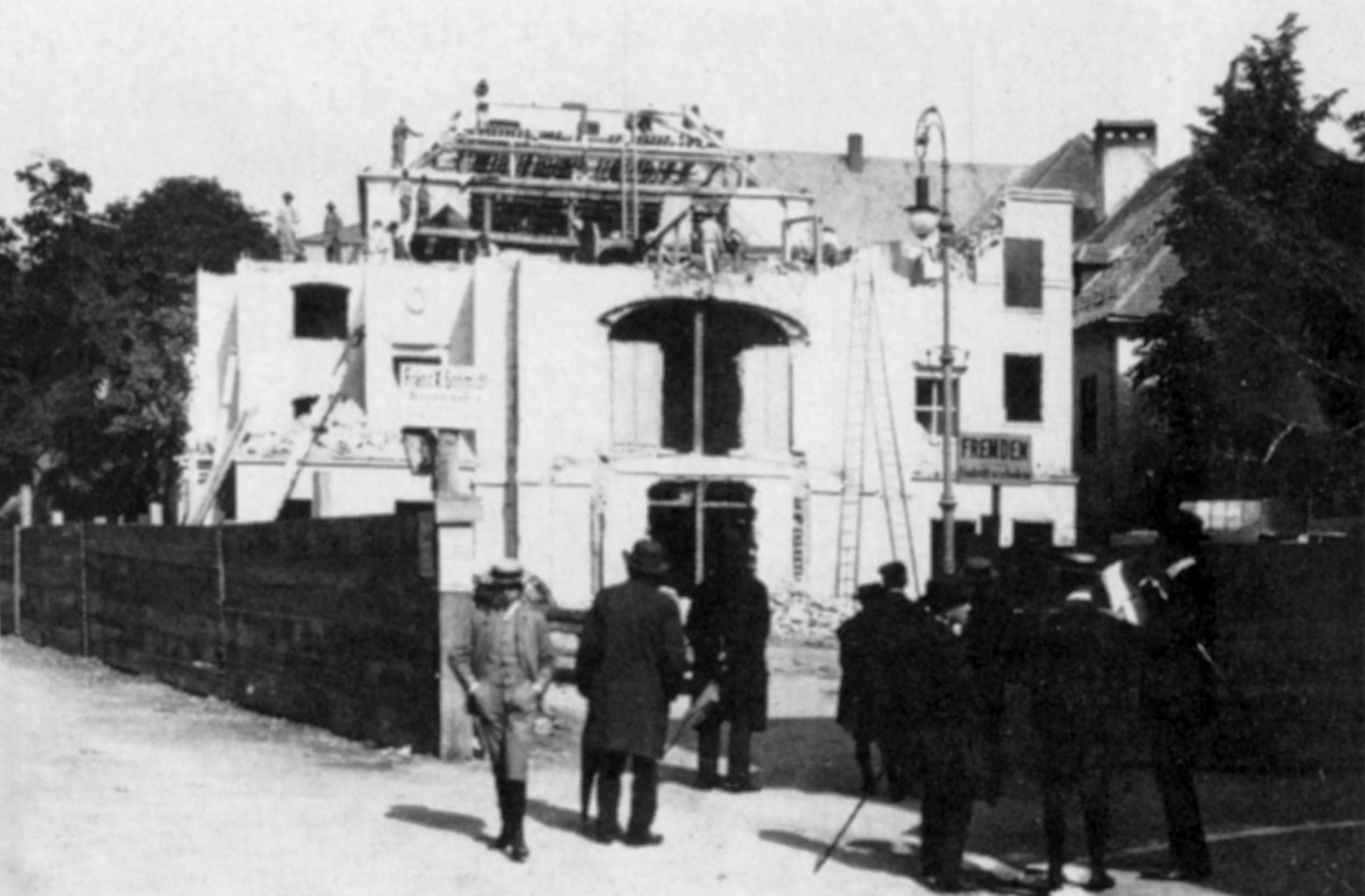 Baden bei Wien, Altes Stadttheater, Abbruch 1908